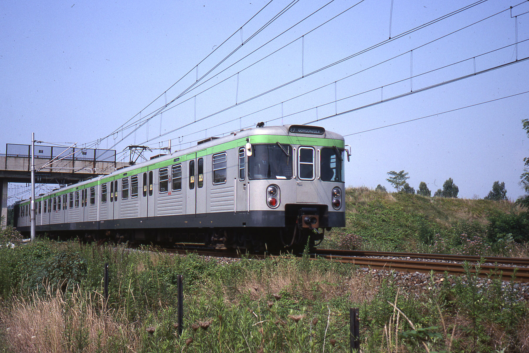 Unità di trazione della metropolitana 2 di Milano (in testa la motrice n. 444), in servizio sulla tratta extraurbana verso Gorgonzola